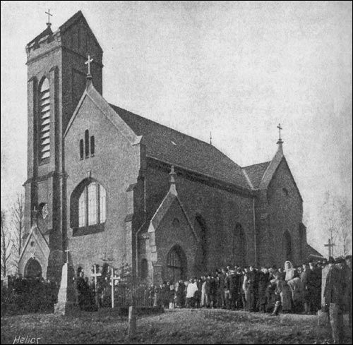 Kościół Serca Jezusa i Najświętszej Marii Panny w Wołczkiewiczach k. Mińska, zbudowany w 1904, wysadzony w powietrze przez Sowietów w latach 50. XX wieku.